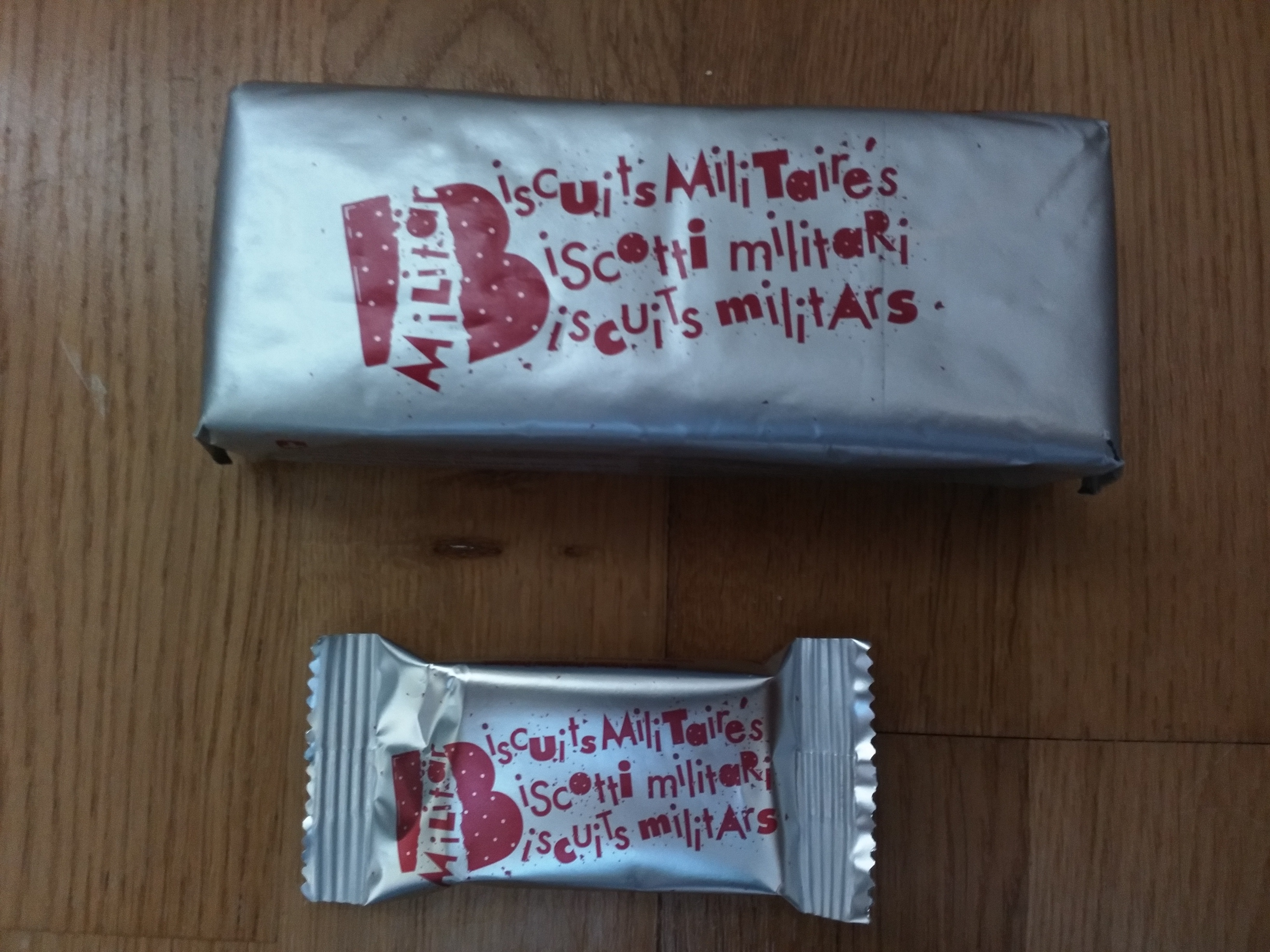 Militärbiscuit gross klein